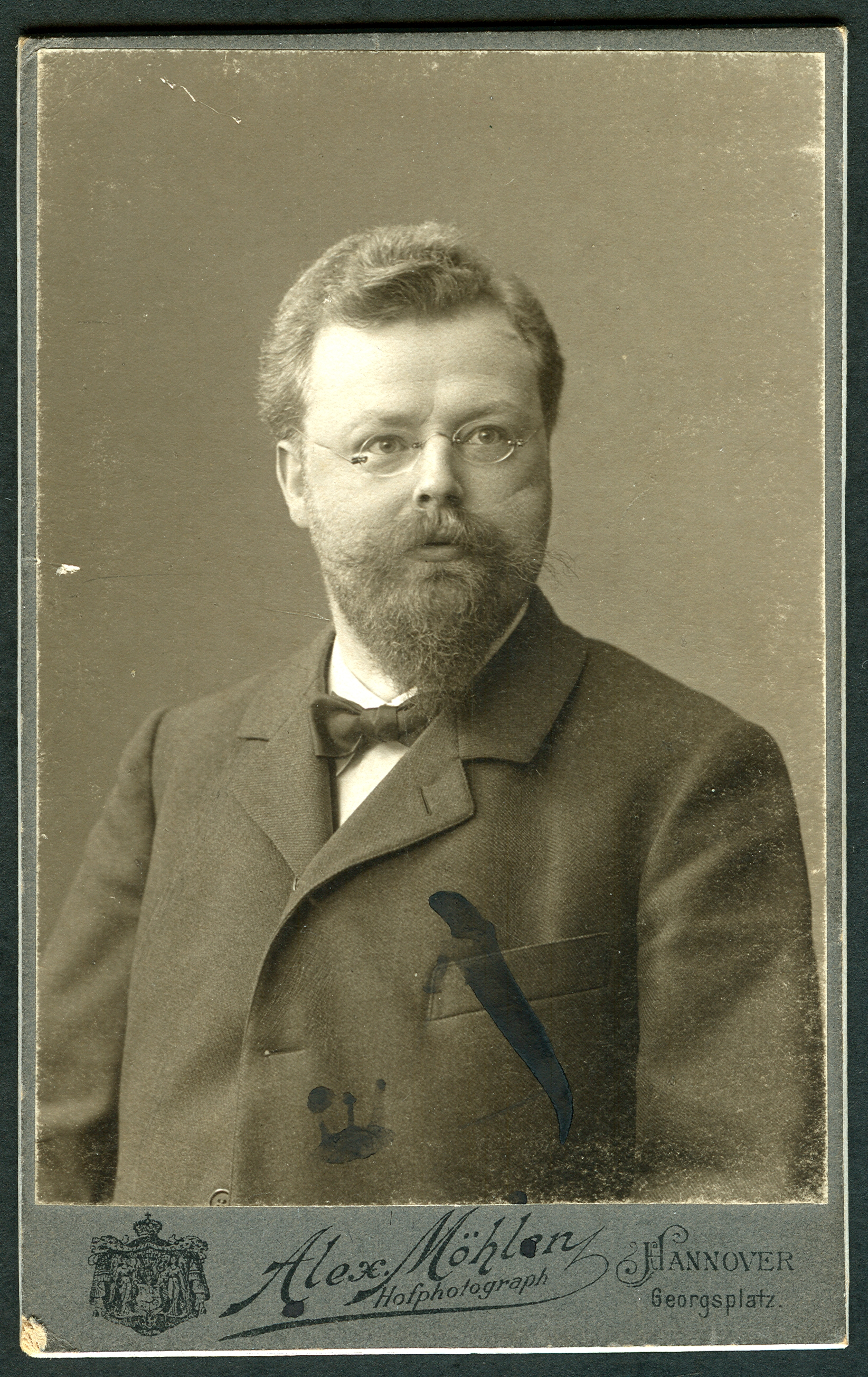 Carte de visite; Brustbild von Karl Toptz (siehe unten, Rückseite), königlich preussischer Polizei-Kommissar 13. Revier Hannover, gefertigt von Alexander Möhlen